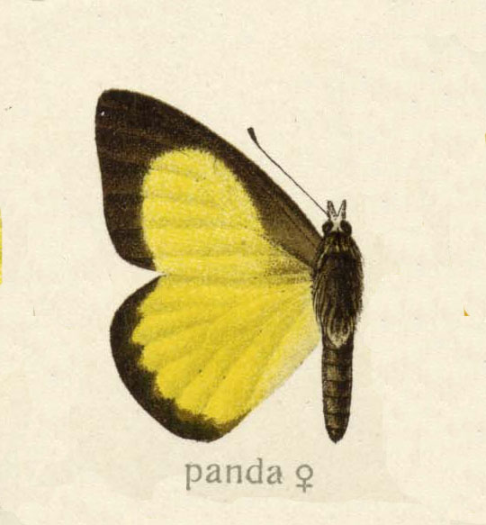 Appias panda